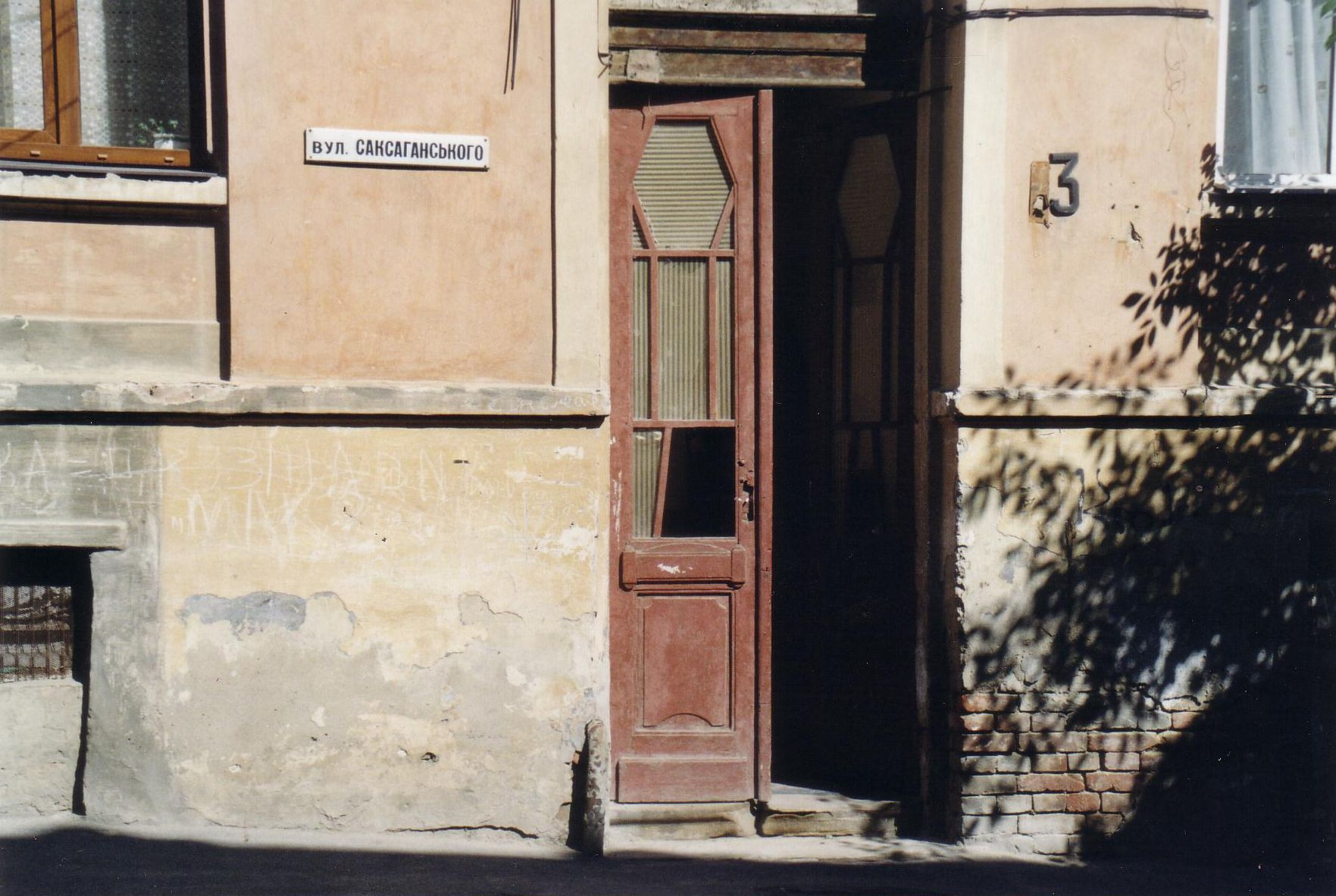 Fotografie vom Eingang des Geburtshauses von Paul Celan in Czernowitz.